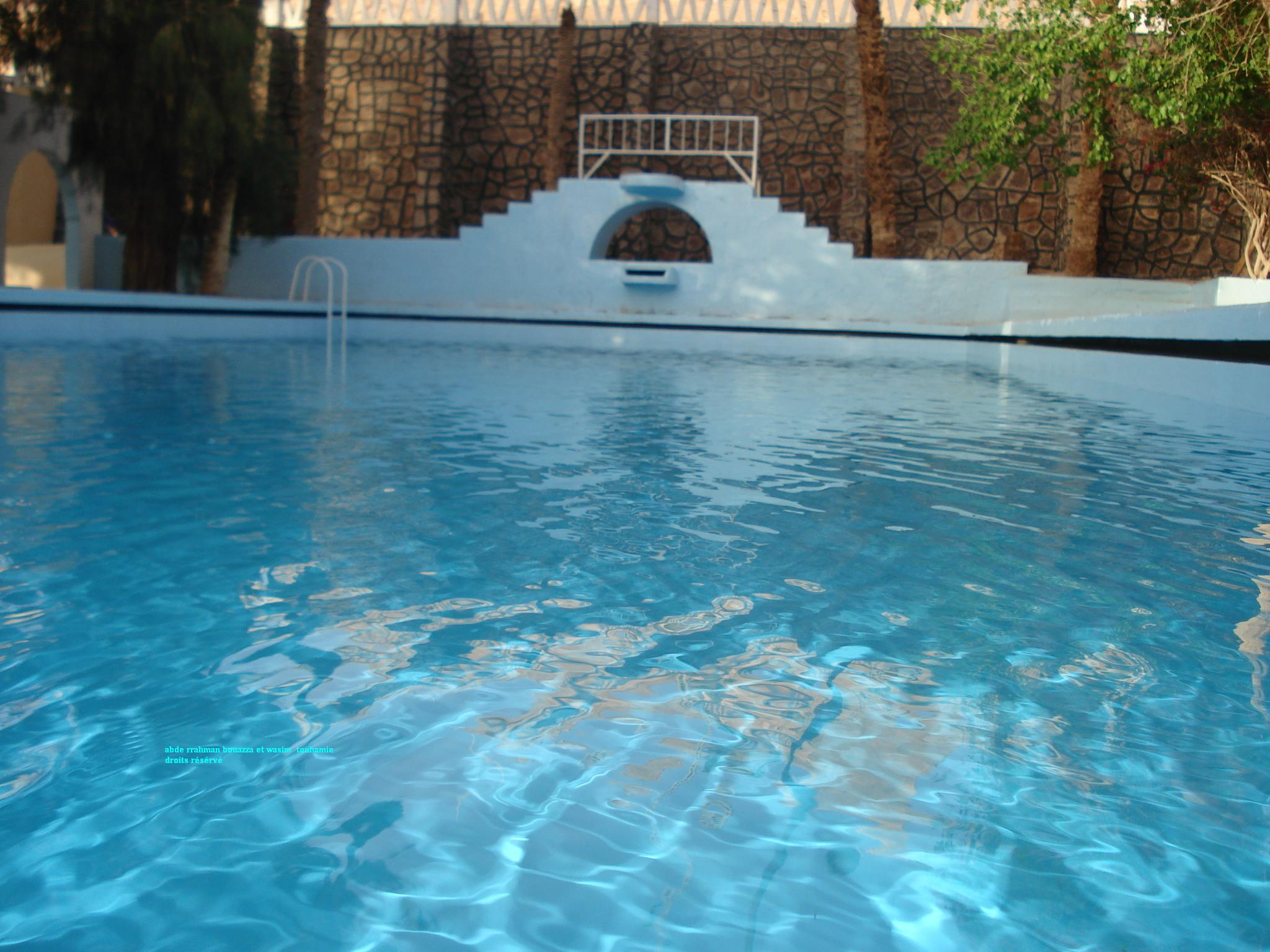 المسبح البلدي لبني عباس.